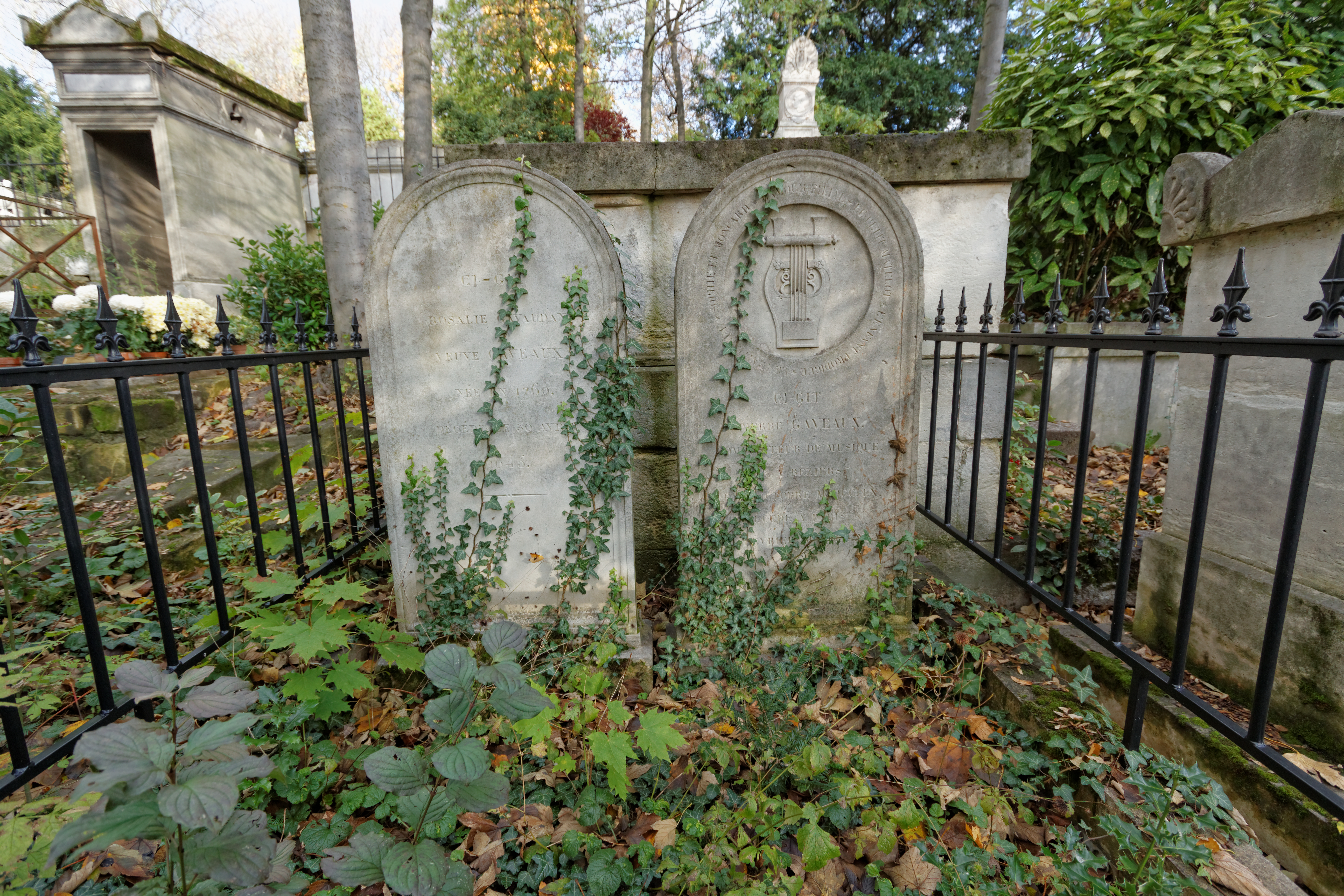 Sépulture du chanteur et compositeur Pierre Gaveaux (1761-1825) et de sa femme.